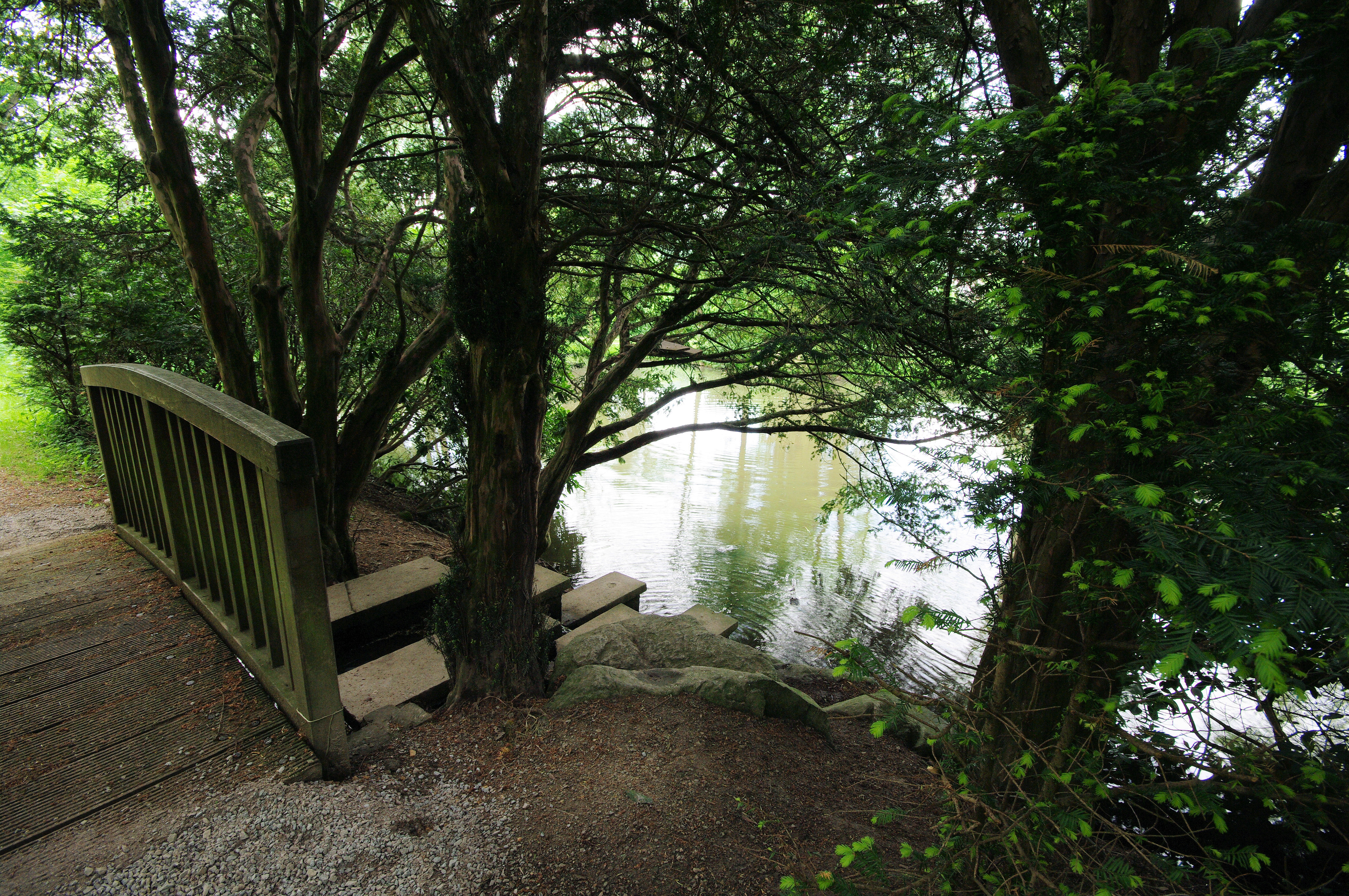 Der Überlauf vom oberen zum unteren Weiher vom oben